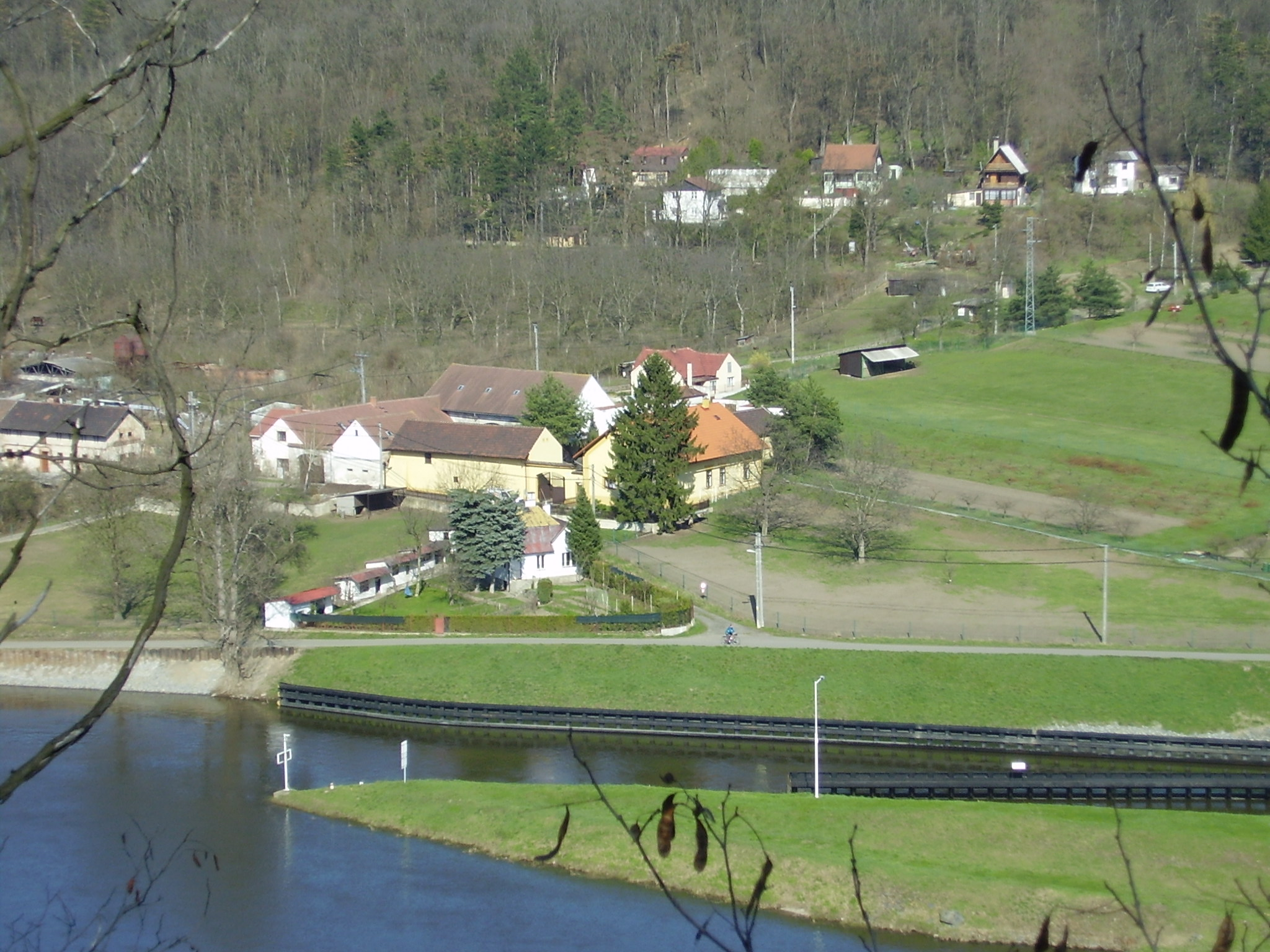 Pohled na Dolánky z protějšího břehu Vltavy